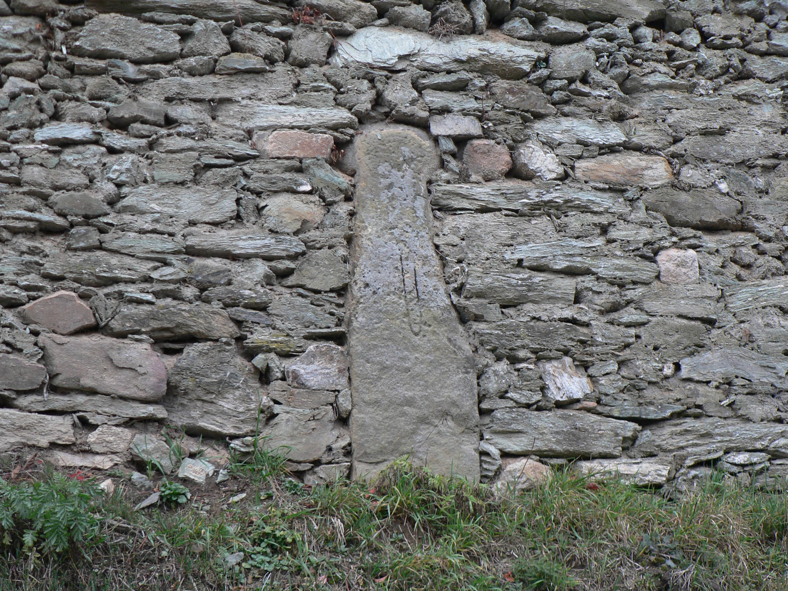 Police, smírčí kříž z 15. století v hřbitovní zdi u kostela